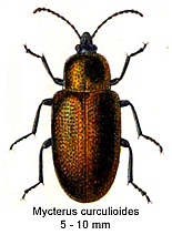 Mycterus curculionides Illig. = Mycterus curculioides (Fabricius, 1781)